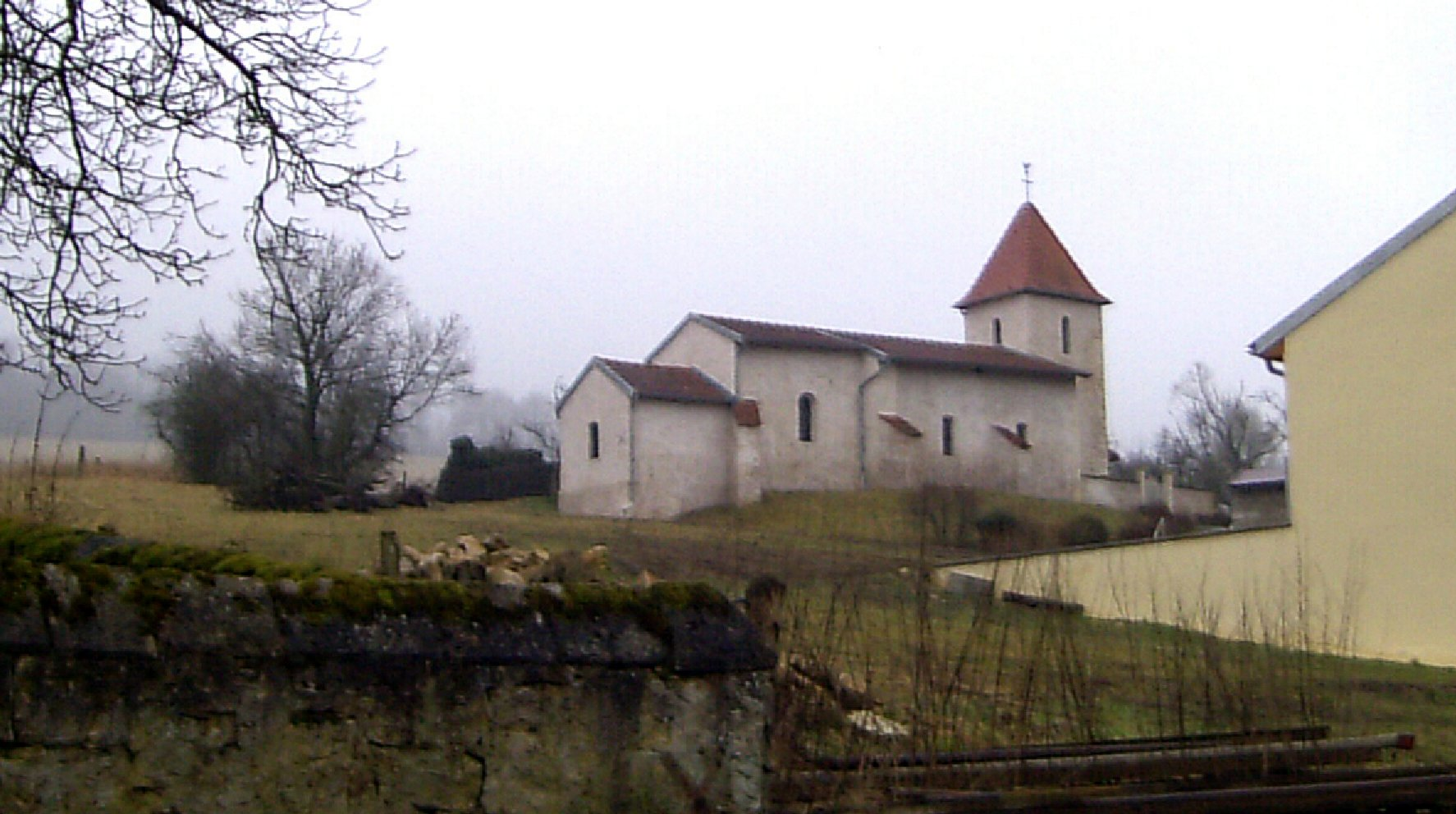 L'église de l'Assomption à Marthemont